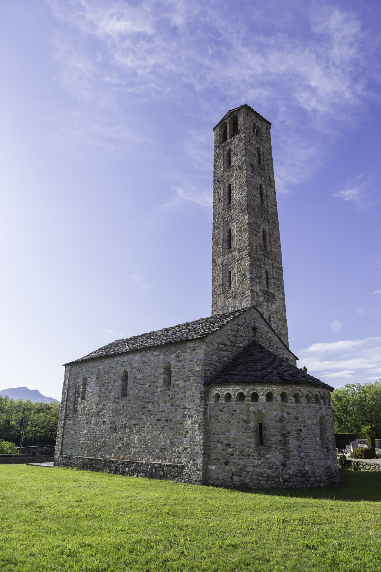 In occasione della Fiera dell'asparago si consiglia la visita alla chiesa romanica di Madonna di Campagna